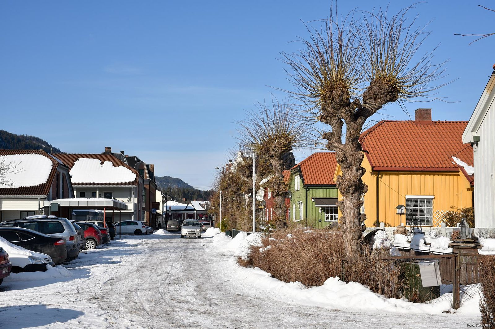 Oscar Nissens gate i «Grønnbyen», Notodden. Boligområdet ble bebygget som arbeiderboliger for Norsk Hydros arbeidere i perioden 1906–1911